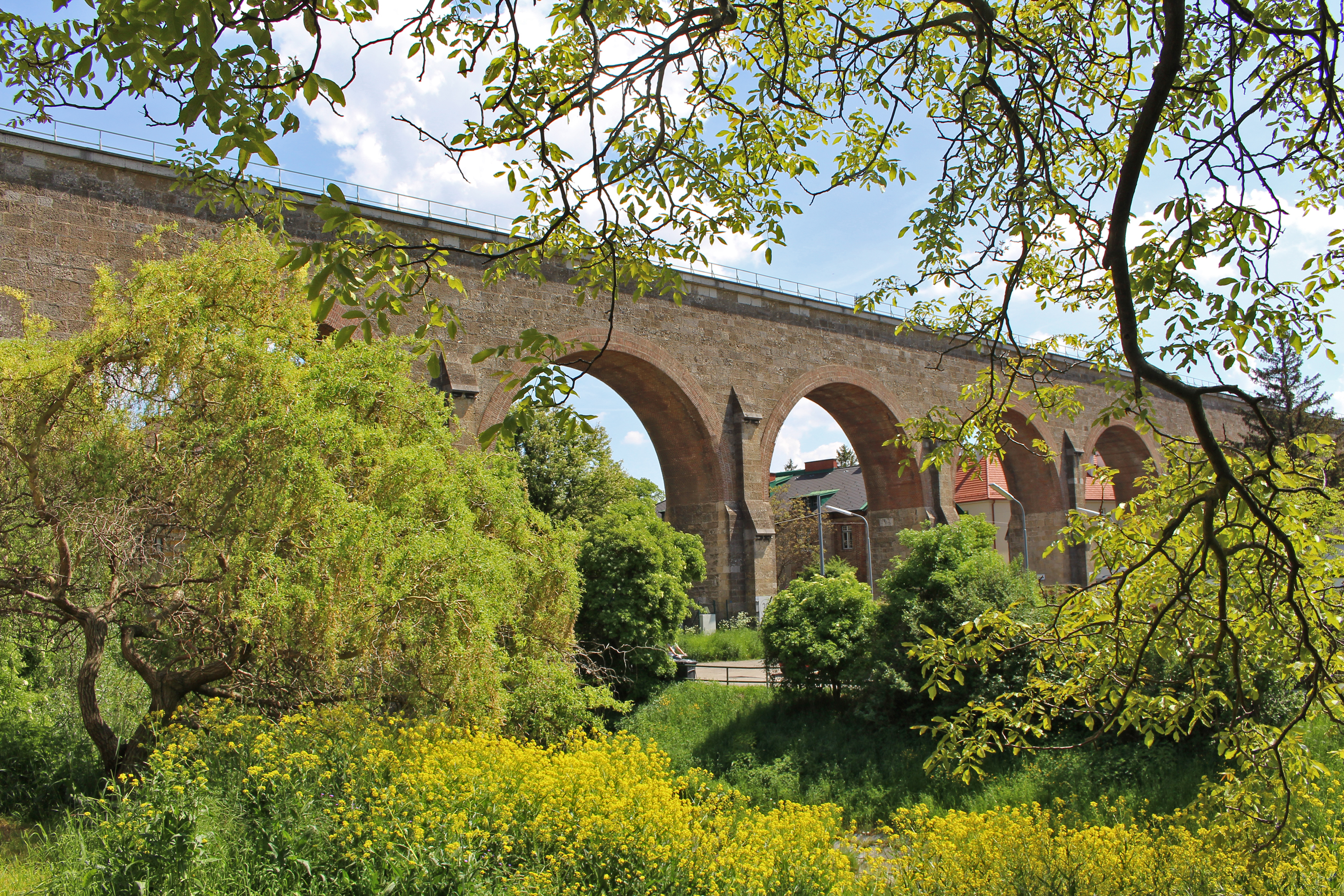 Teil der 1. Wiener Hochquellenleitung